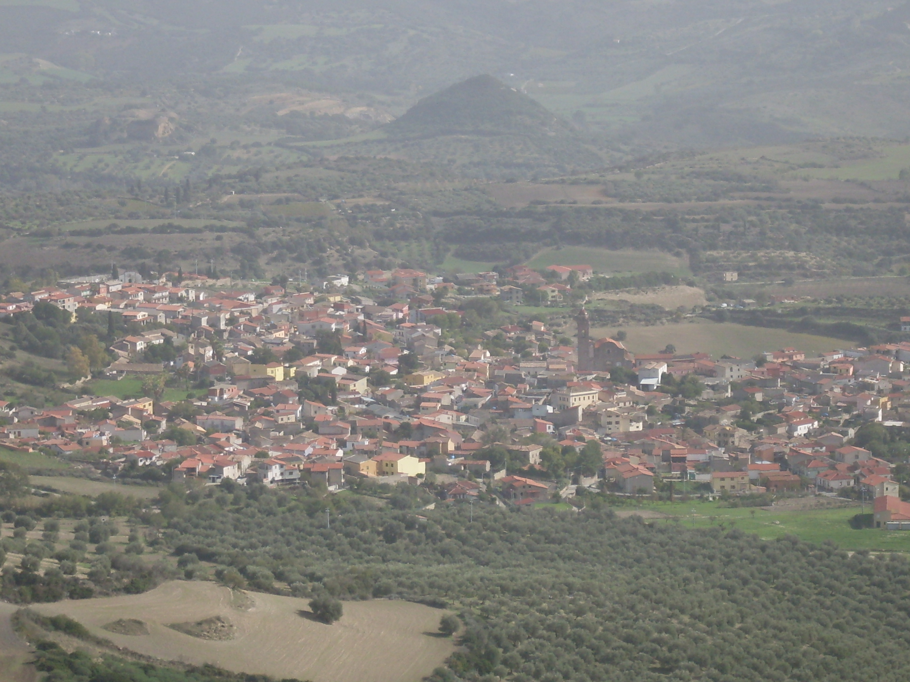 == Licenza d'uso: ==